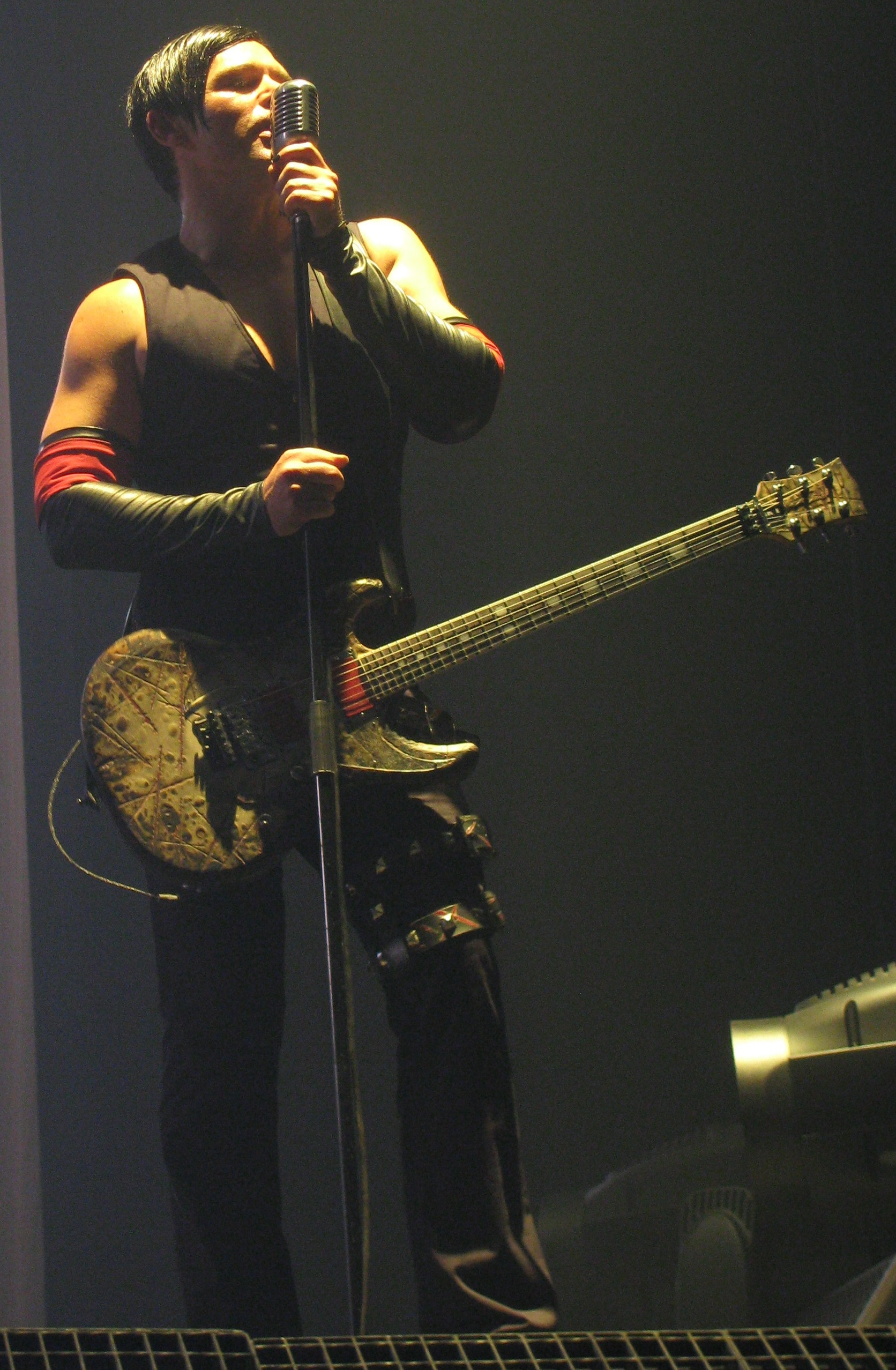 Richard Kruspe lors d'un concert de Rammstein Rockhal / Luxembourg le 31 Janvier 2010